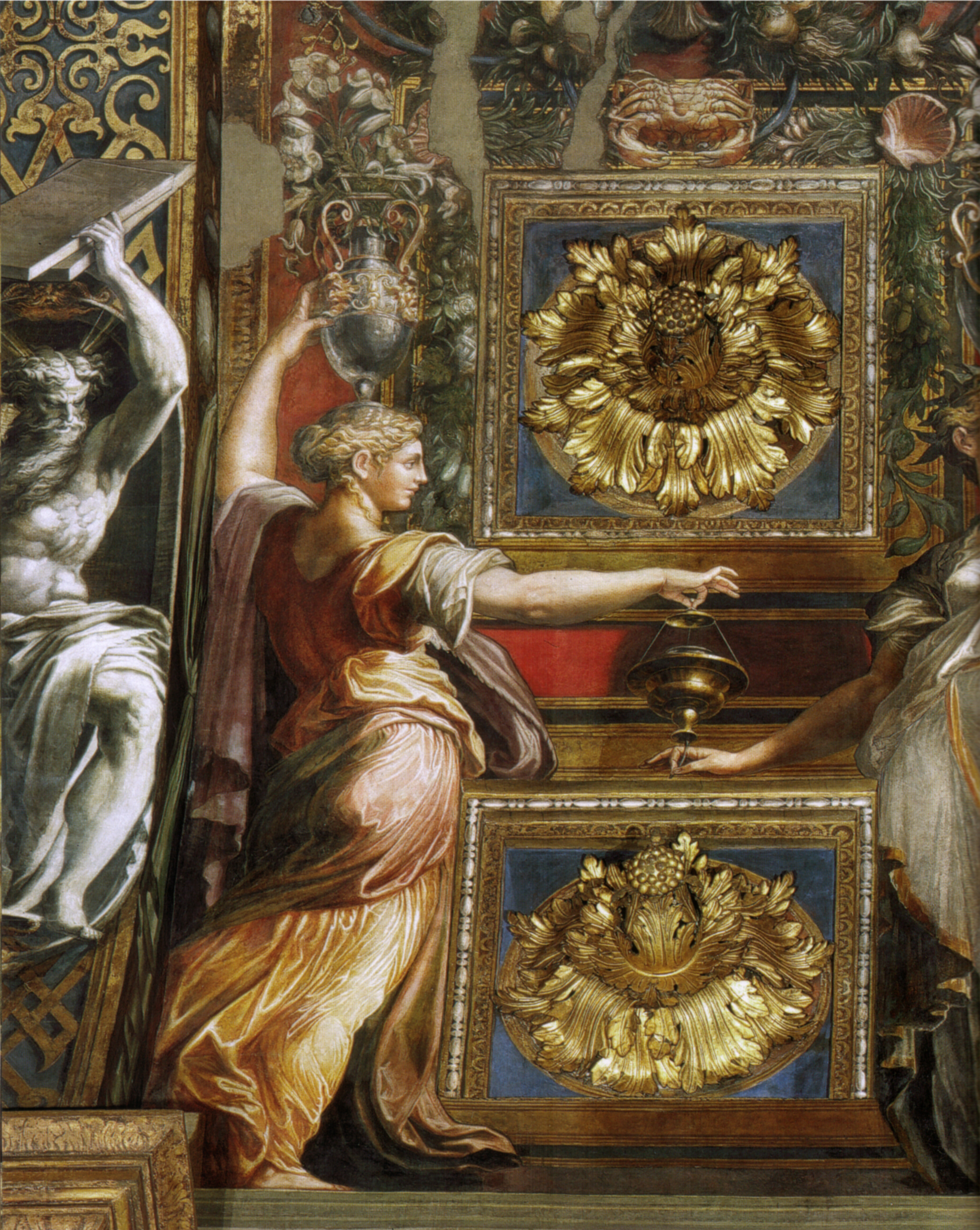 detail